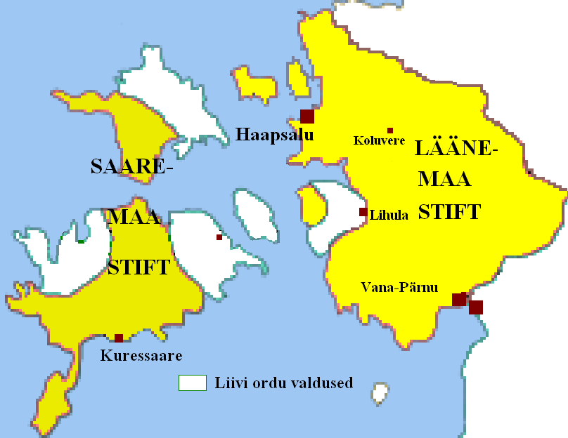 Saare-Lääne piiskopkonna kaart